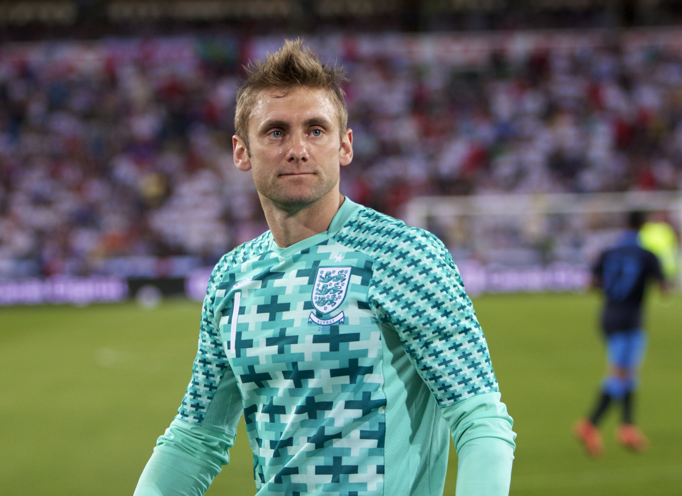 Robert Green, goalkeeper for England.